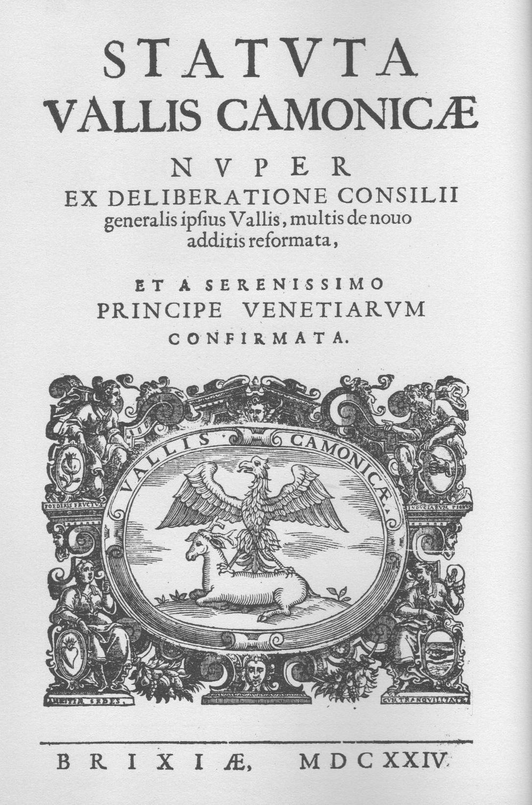 Statuta Vallis Camonicae - MDCXXIV